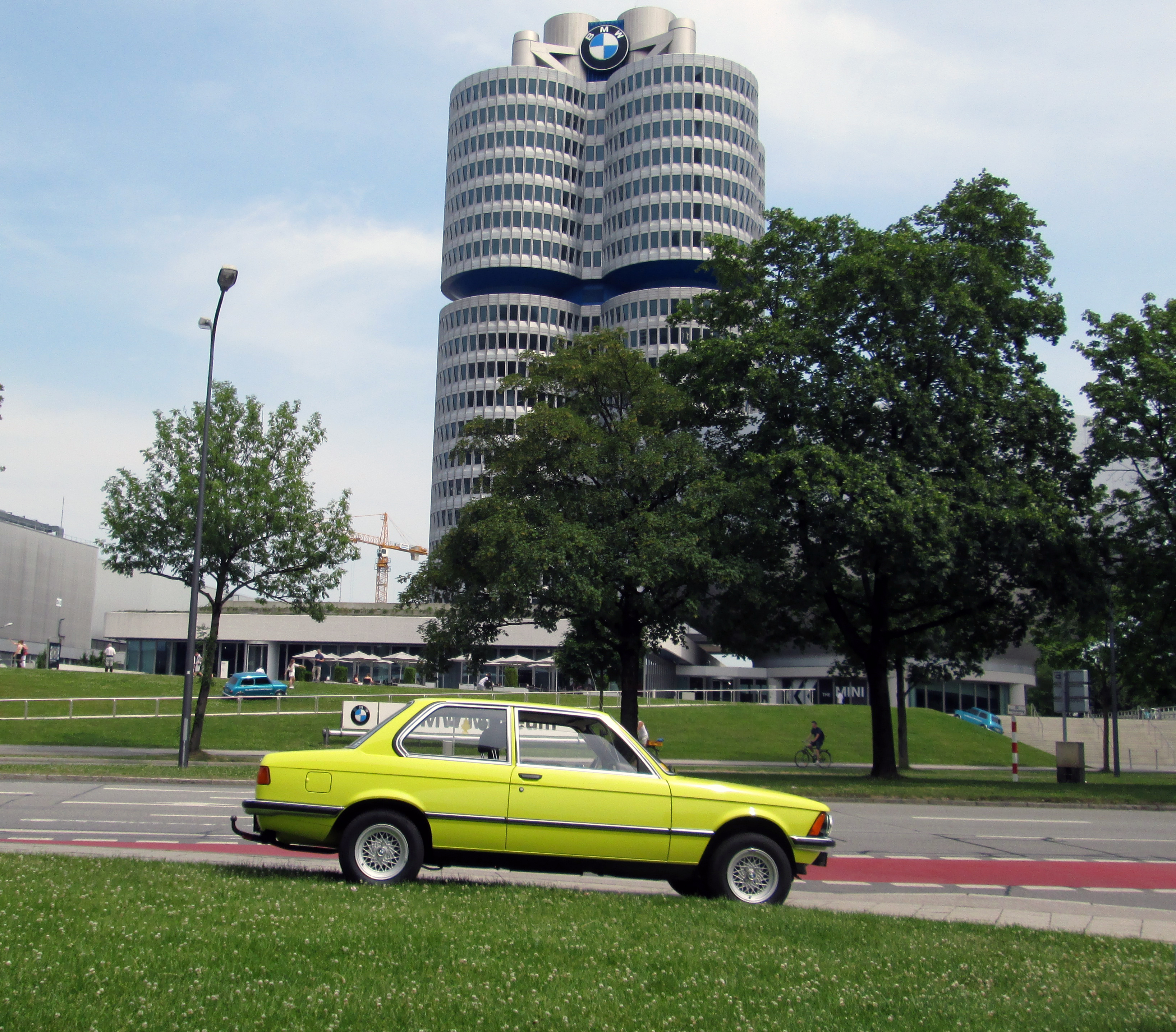 BMW 318 Seitenansicht